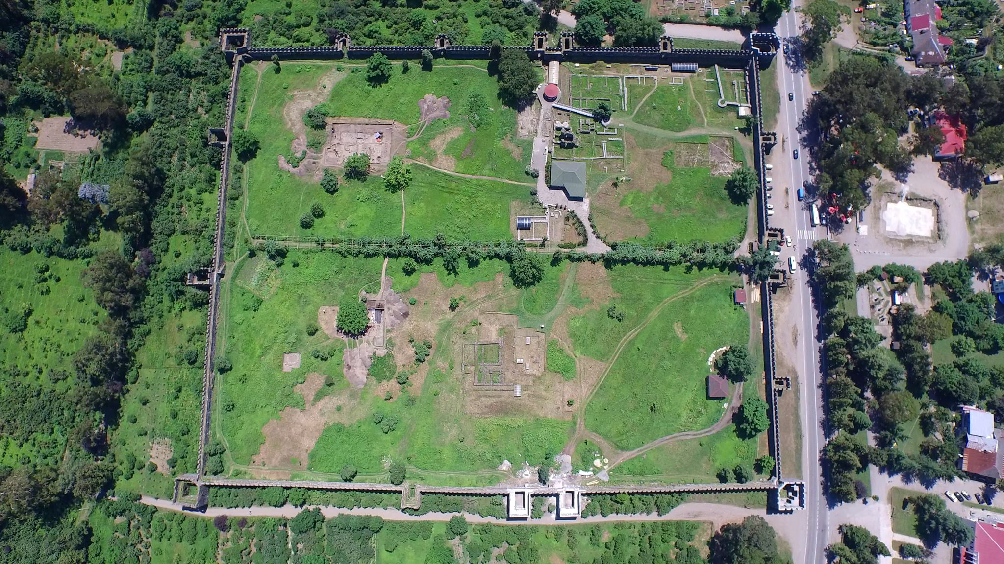 აფსაროსის არქიტექტურულ-არქეოლოგიური კომპლექსი